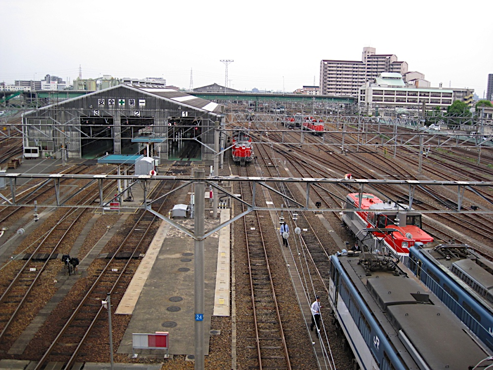 愛知機関区。